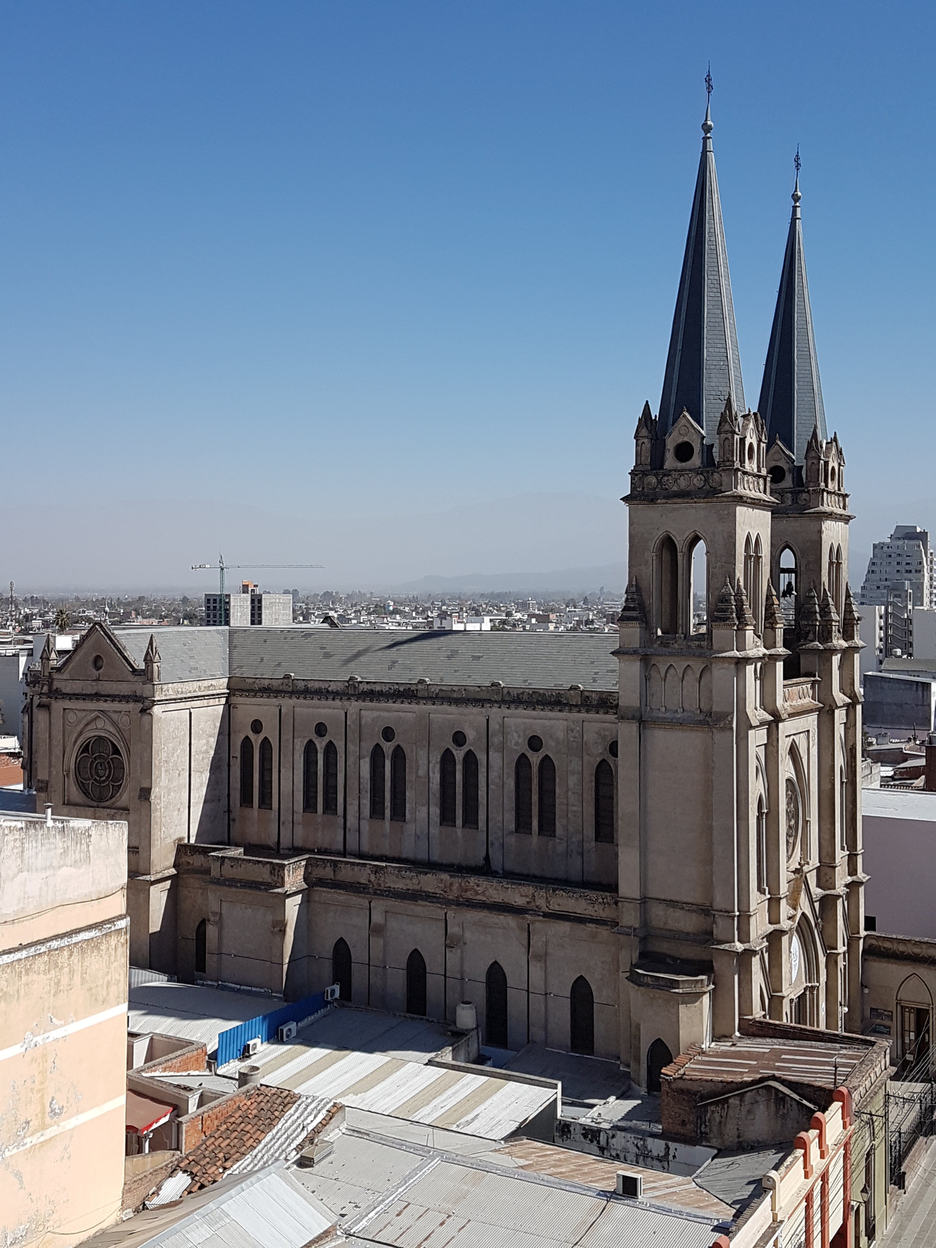 La parroquia San Juan Bautista de la Merced, más conocida como iglesia de la Merced es uno de los primeros templos católicos edificado en el año 1700 en la ciudad de Salta, tiene un estilo arquitectónico neogótico, único en la ciudad, se distingue por su perfil arquitectónico por fuera y por dentro, ya que tiene contraste con un juego cálido de luces que acompañan detalles únicos. En su interior resguarda un de los tesoros que dan testimonio de la gesta patriótica; la Cruz de la Batalla de Salta, mandada a hacer por el general Manuel Belgrano y también se destaca por las imágenes que resguarda.Edificio histórico